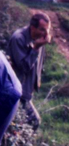 Der Mittelalterhistoriker Hartmut Hoffmann (1930–2016) in der Campagna Romana